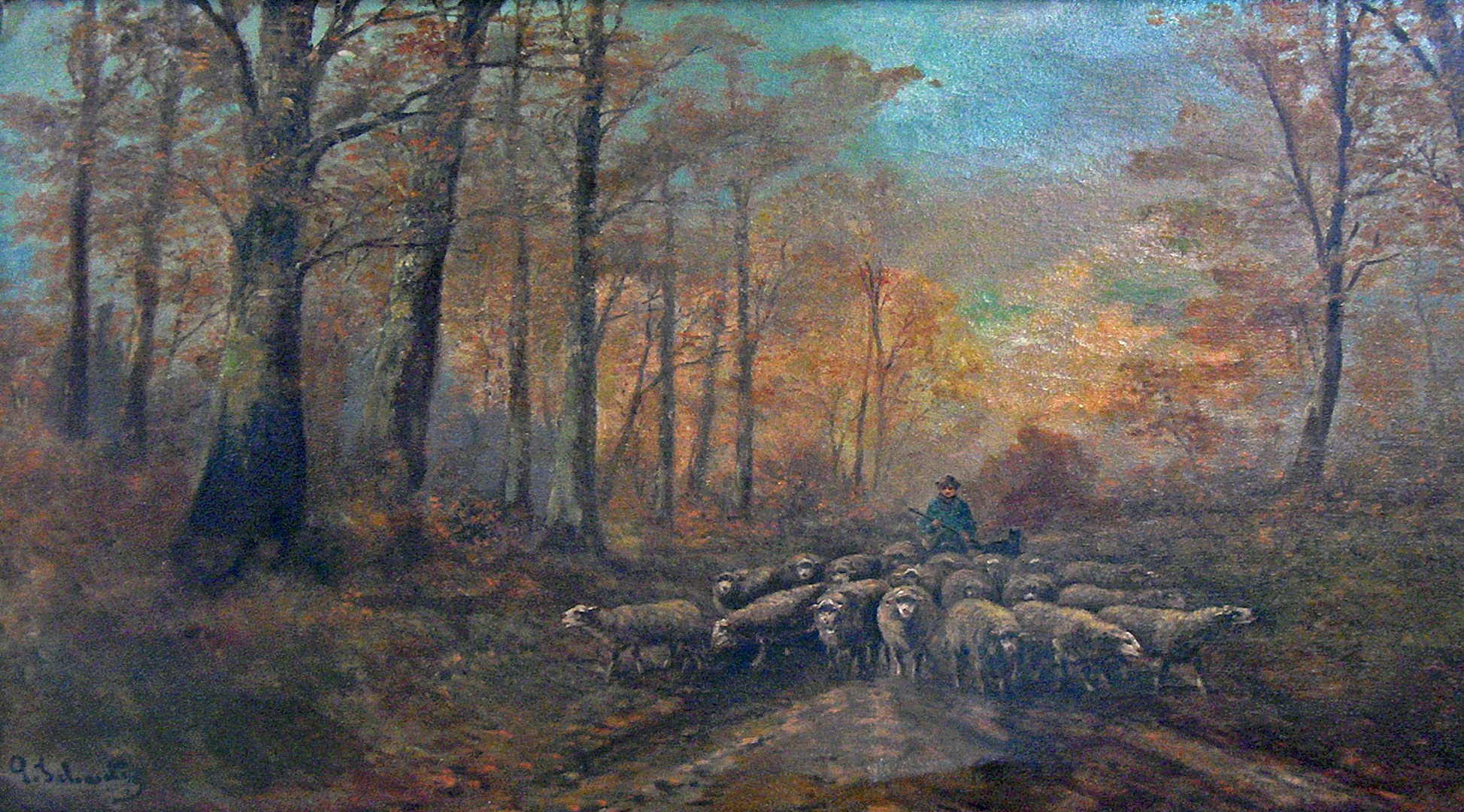 "Lanschap met herder en kudde schapen", olieverf op doek, 77 x 140 cm, door Paul Schouten (1860-1922); privé-bezit